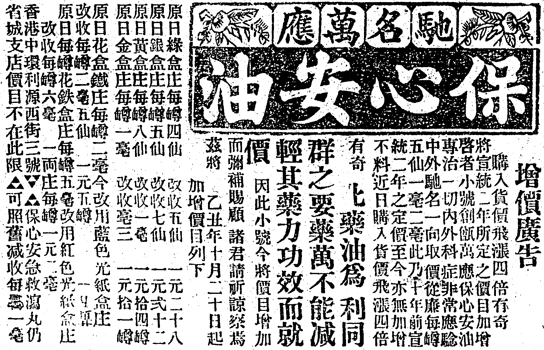 粵語: 一九二六年香港工商日報保心安油增價廣告